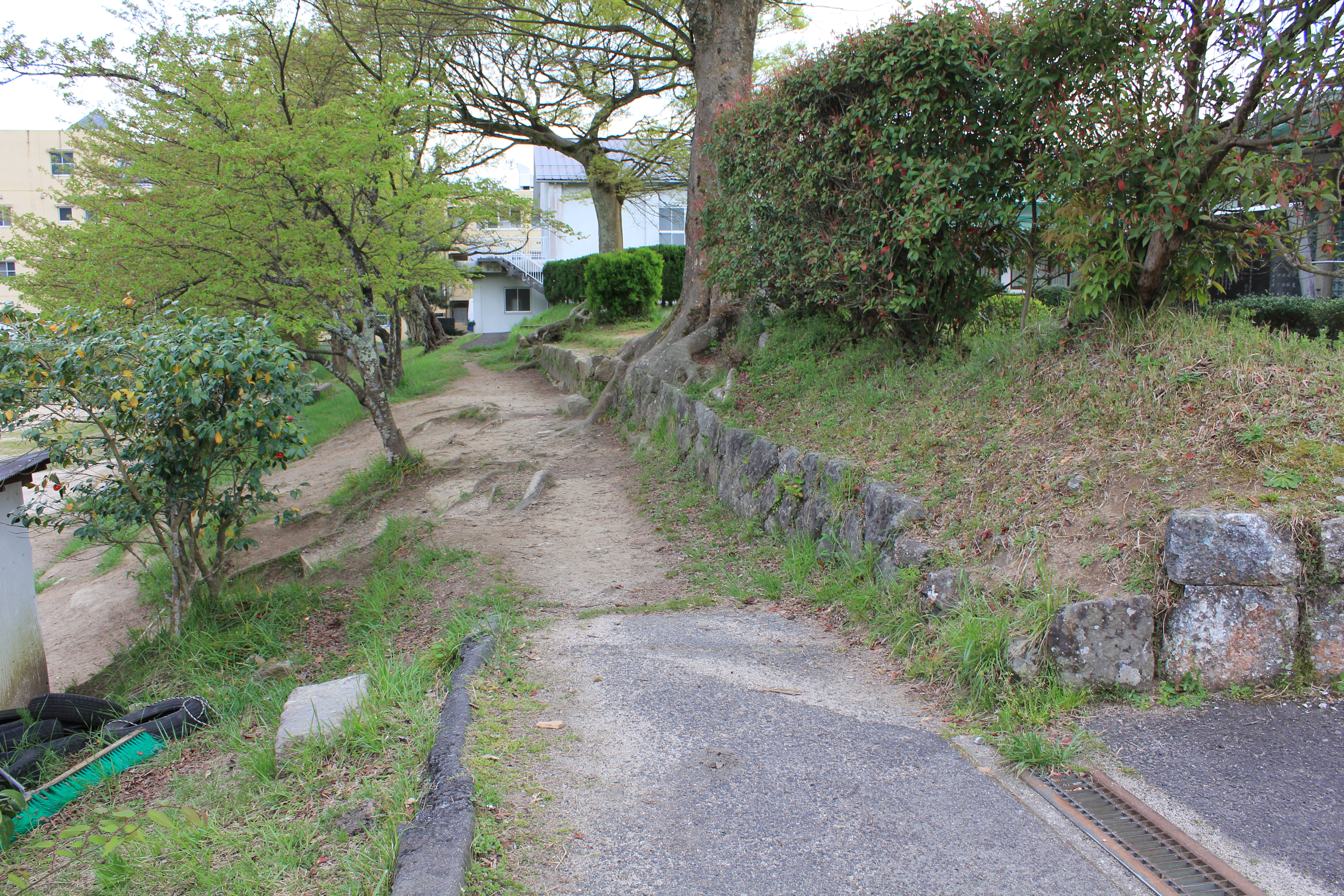 広瀬陣屋後に残存する土塁と石垣